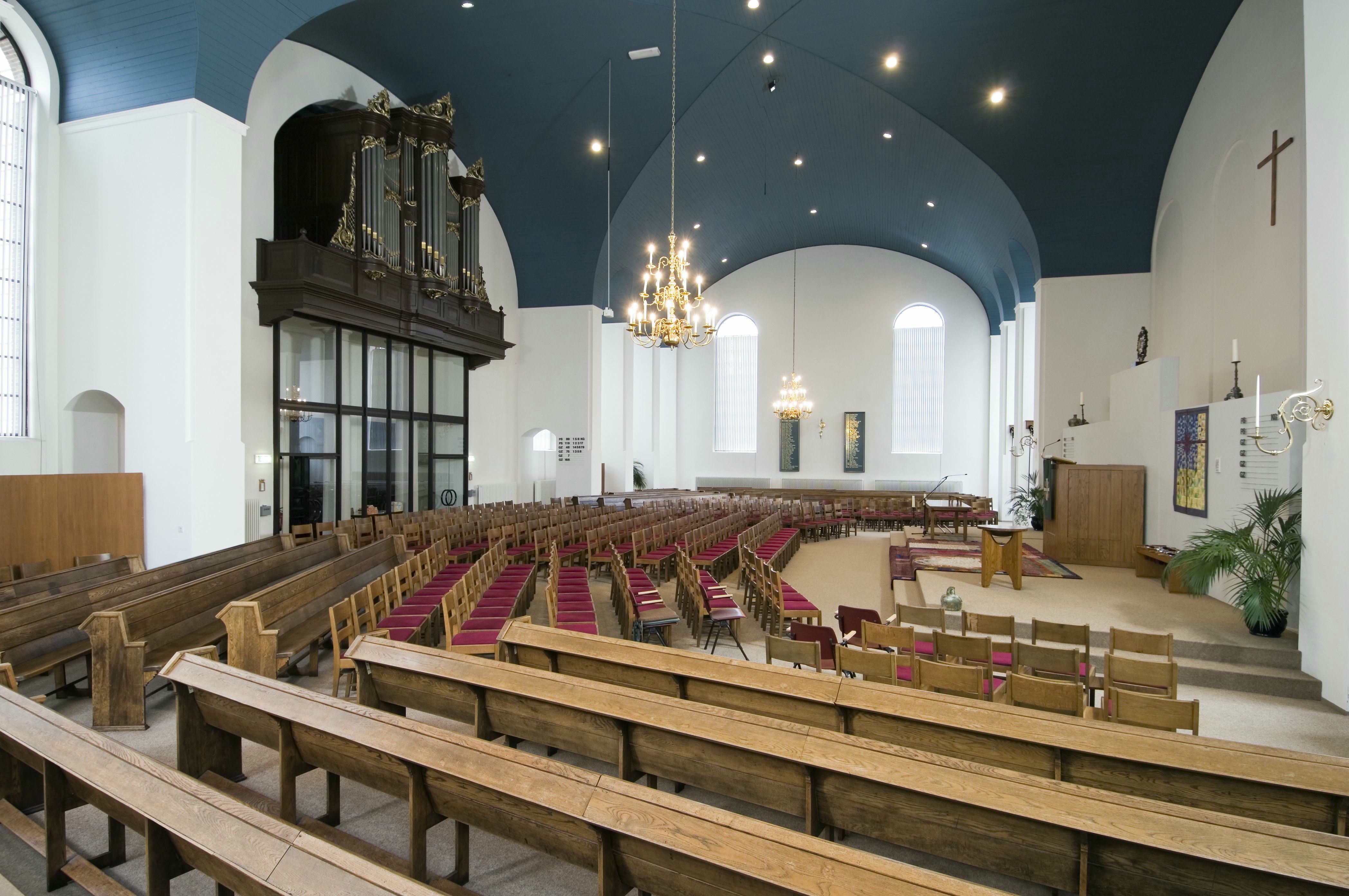 Hervormde Jozefkerk: Interieur kerk, overzicht kruisgewelf